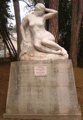 Alfred Boucher, Grand Nu féminin, 1895, statue, Aix-les-Bains (Savoie, France), parc du musée Faure. Le parc est librement accessible au public.